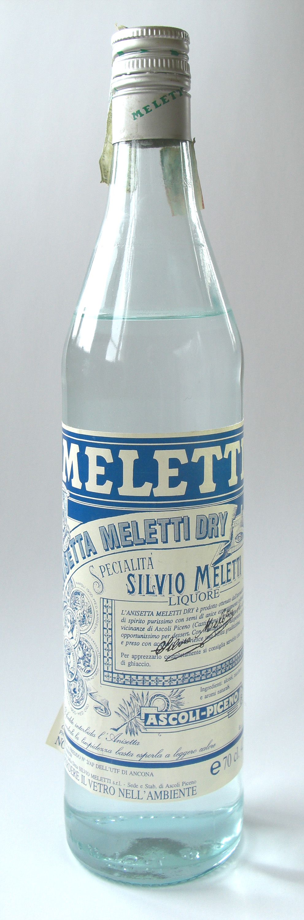 Anisetta Meletti from Ascoli Piceno in Marche in Italy.